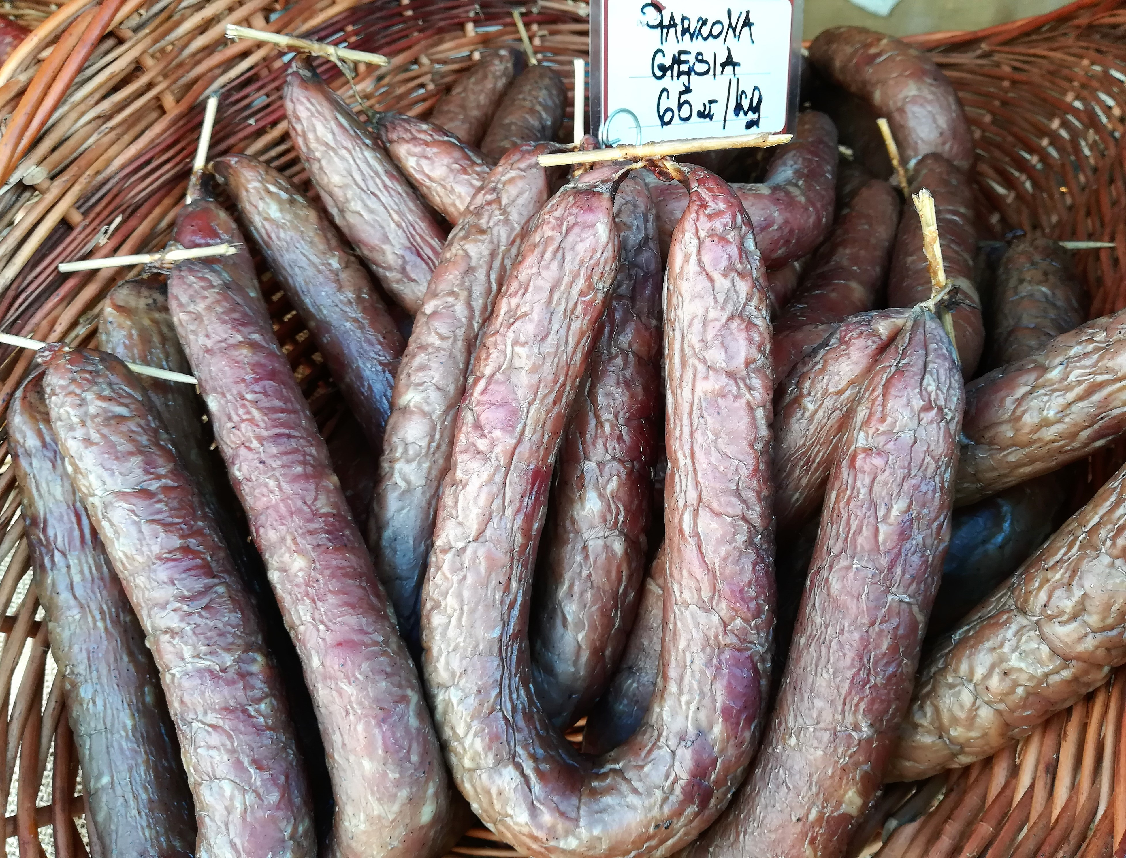 Ogólnopolski Festiwal Dobrego Smaku w Poznaniu - VIII 2018r.